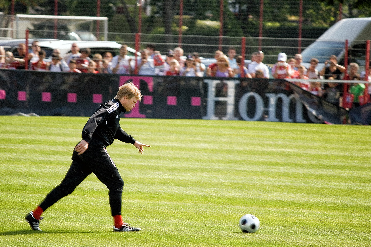 Säbener Straße, München, Bayern, Datum/Uhrzeit: 15.05.2008 10:19:52